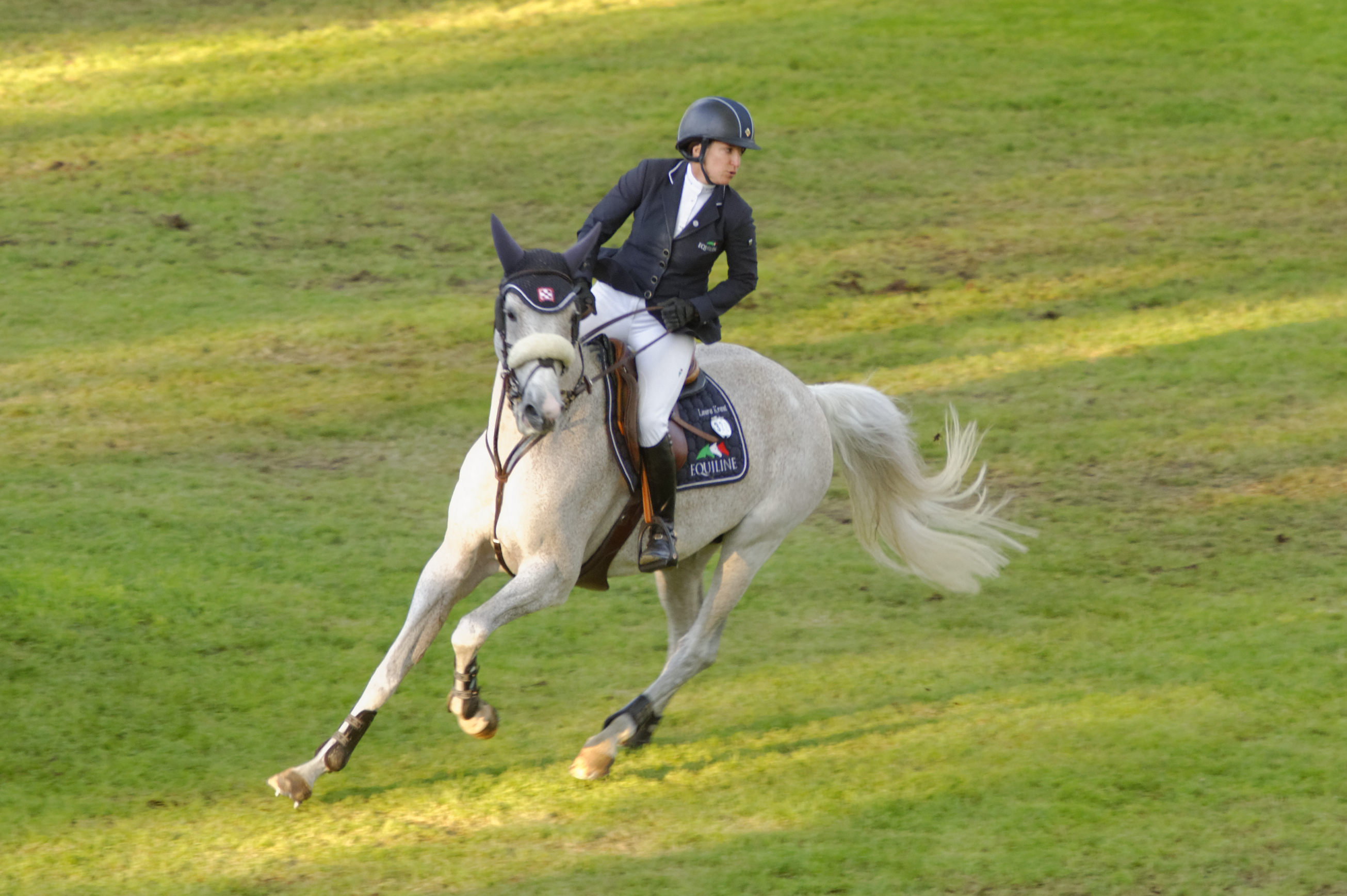 Internationales Pfingstturnier Wiesbaden 2013